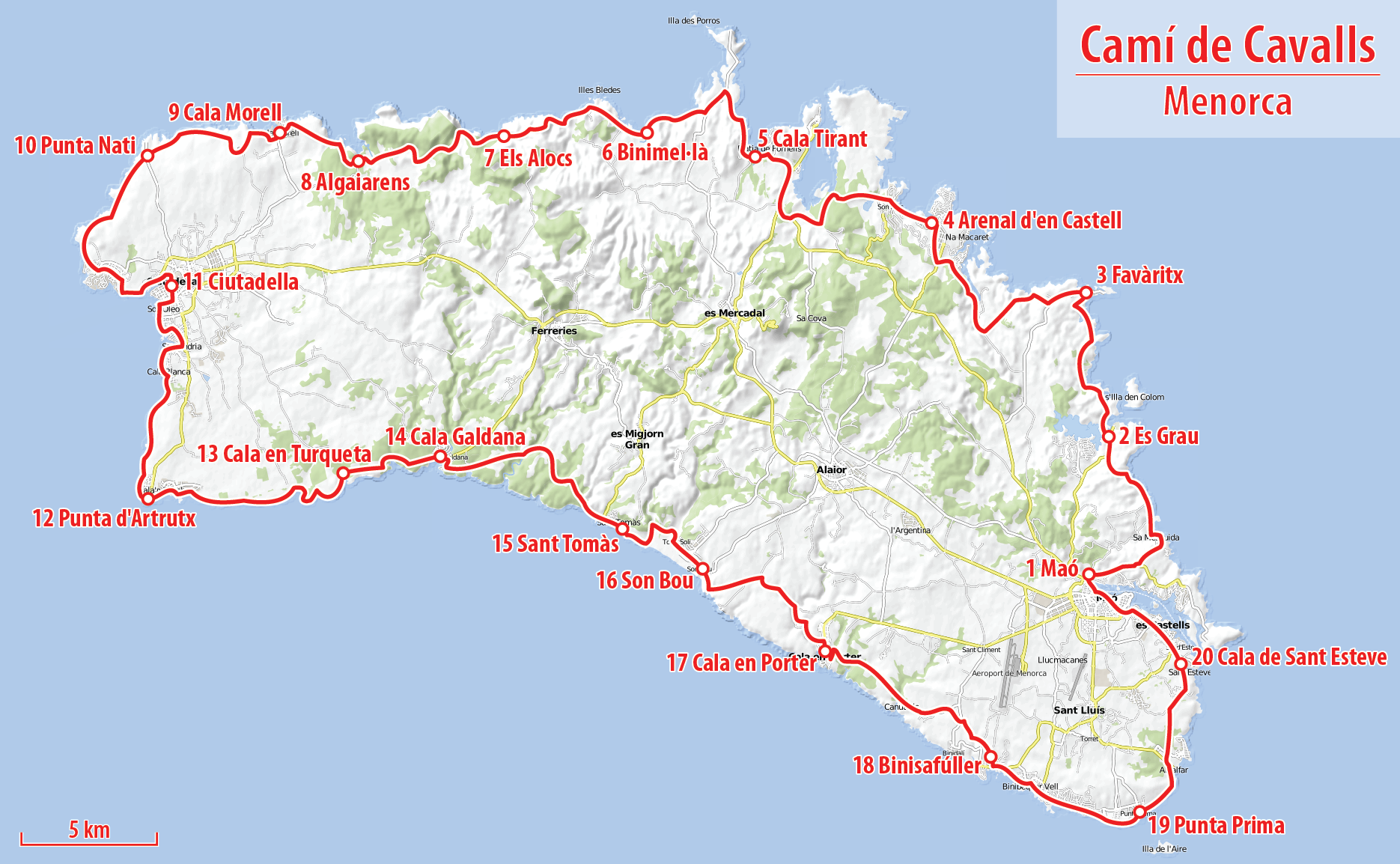 Karte des Camí_de_Cavalls auf Menorca